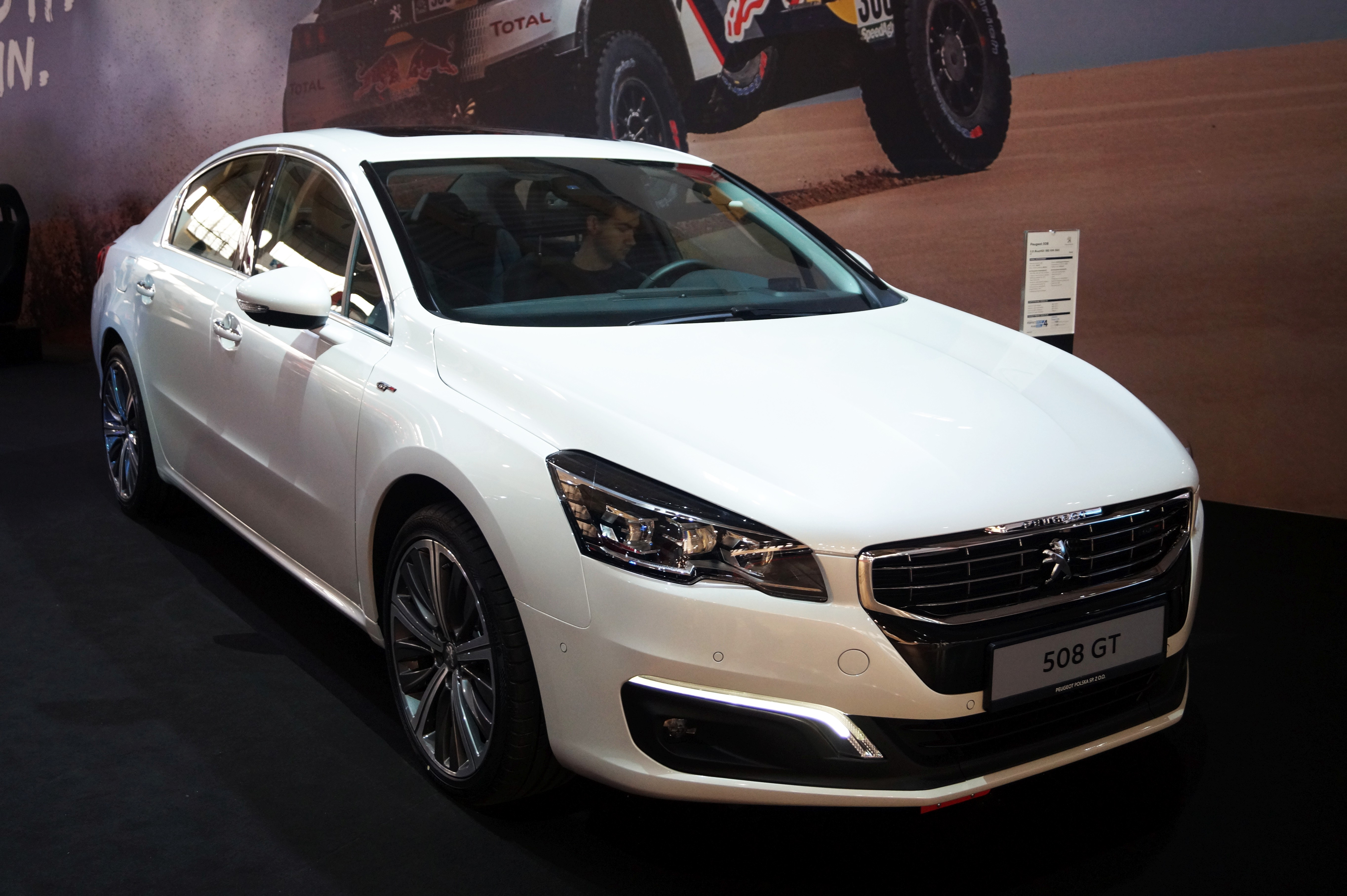 Peugeot 508 GT na Motor Show Poznań 2017.